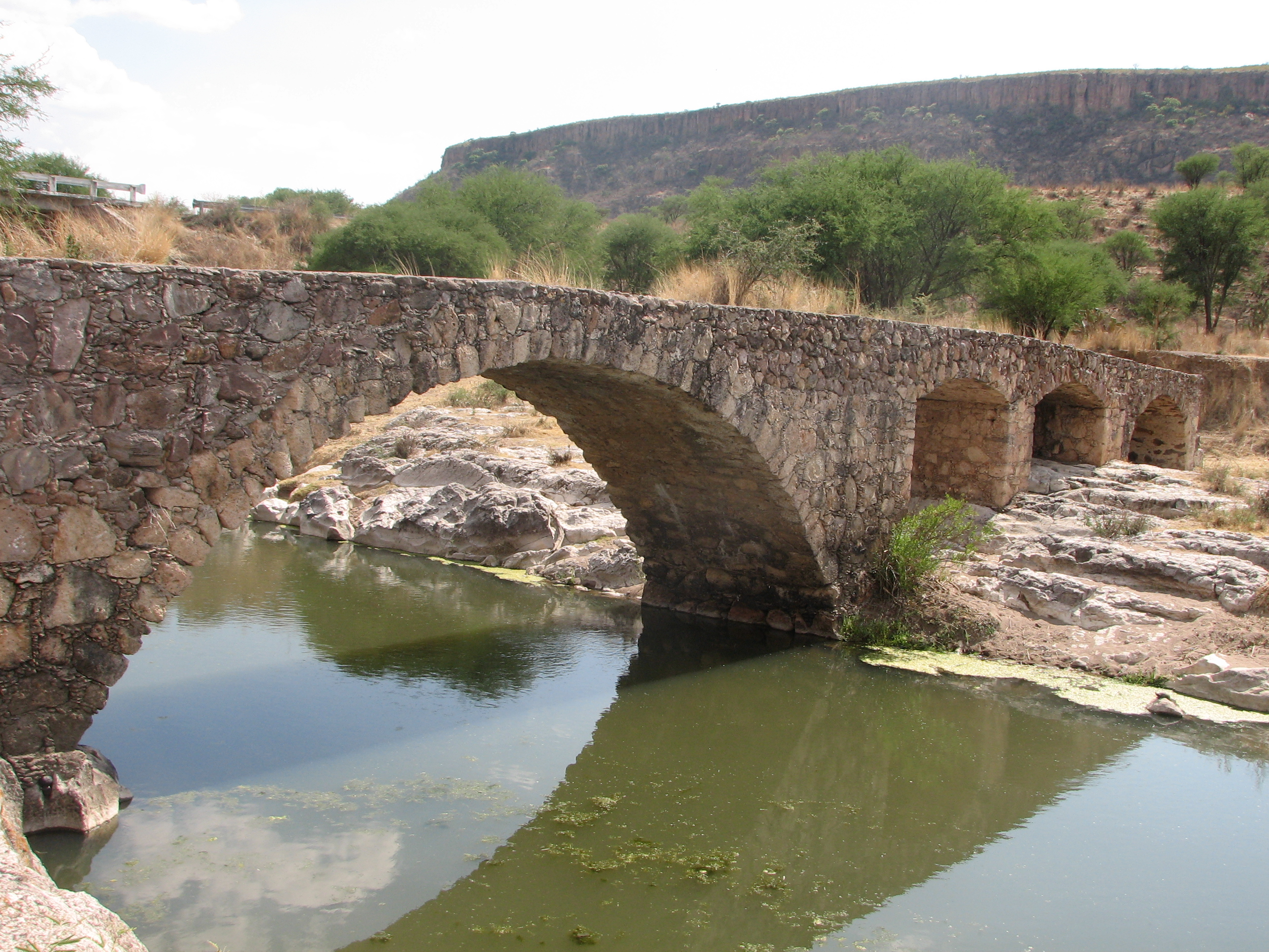 Puente antiguo de Totatiche